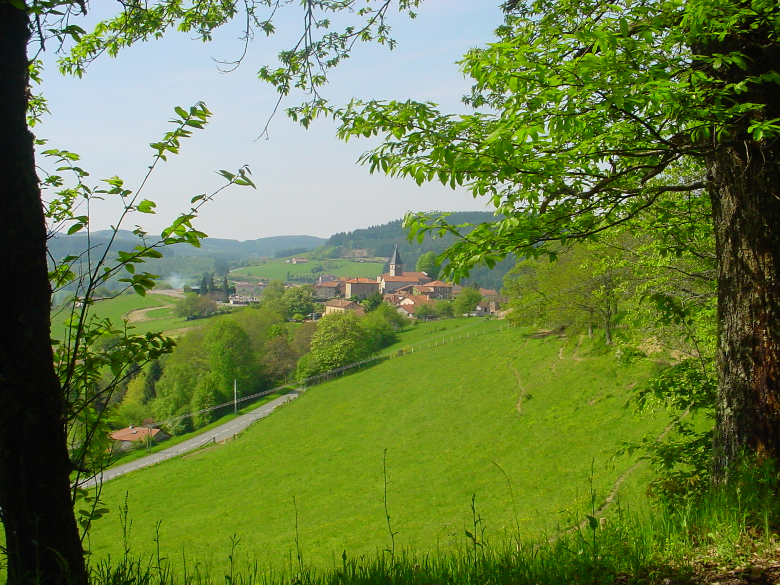 Thel dans son écrin de verdure